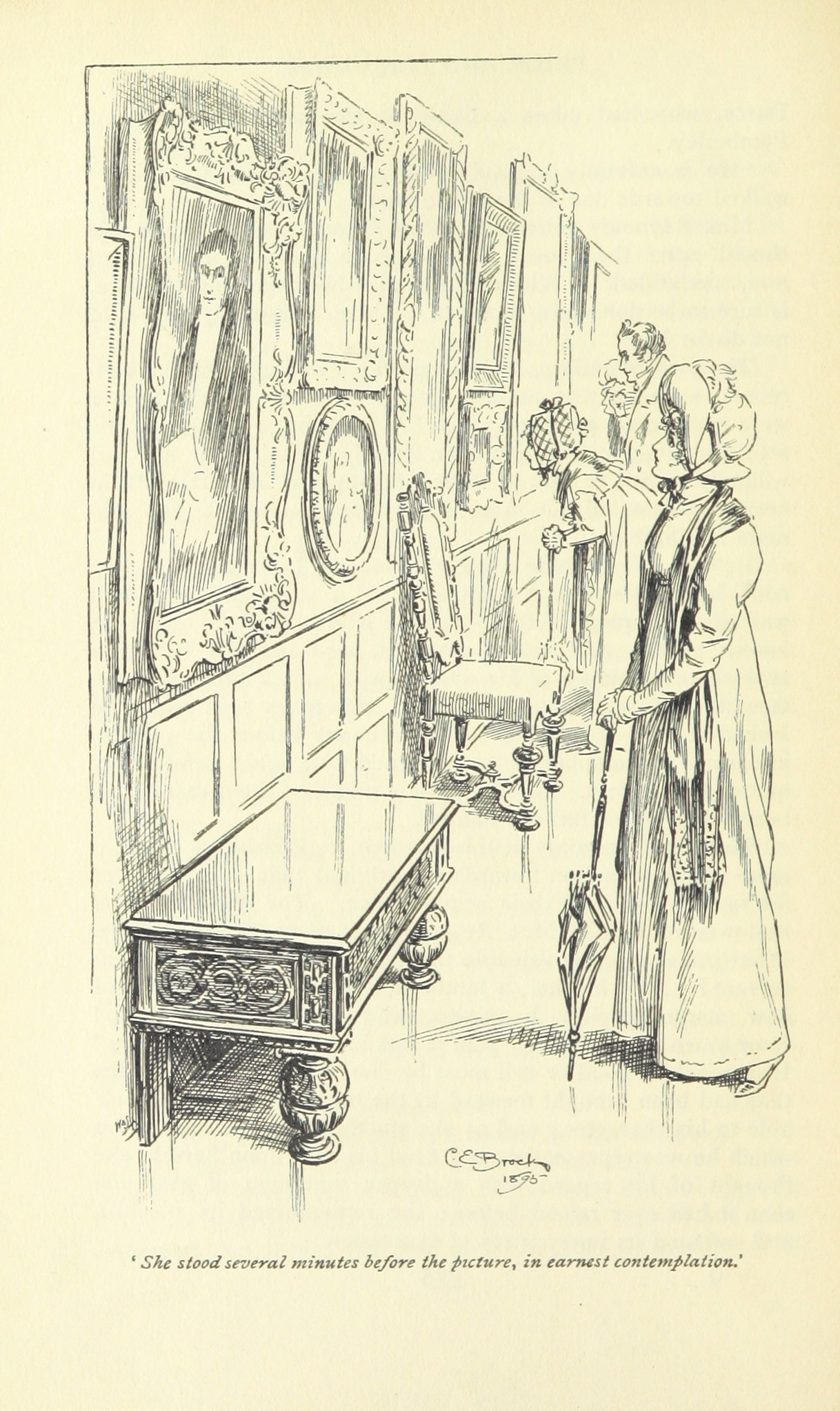 Illustration de C. E. Brock pour Pride and Prejudice (Edition MacMillan & C°, ch. 43) Elizabeth en contemplation devant le portrait de Darcy à Pemberley